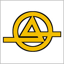 Логотип ООО «Курганский автобусный завод»